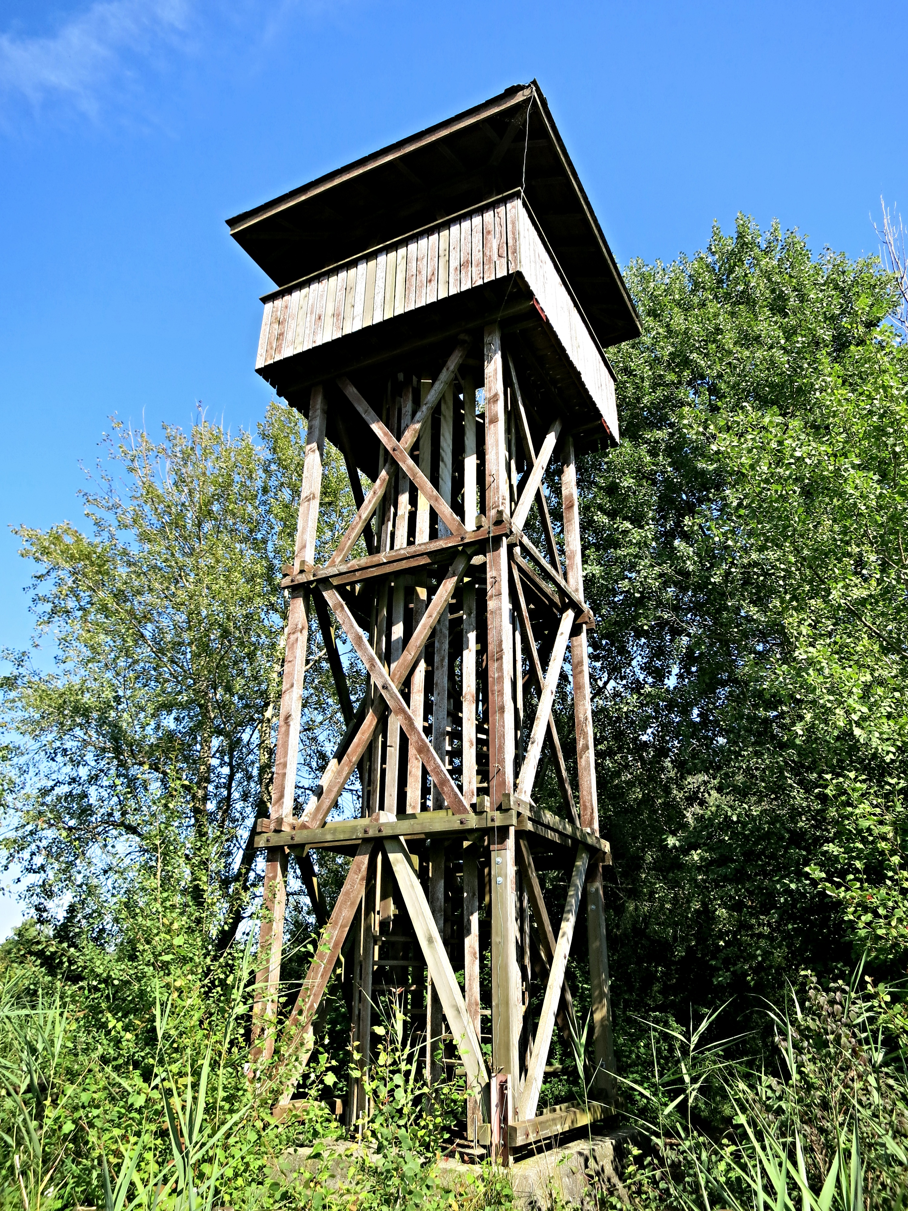 Heidenwegturm